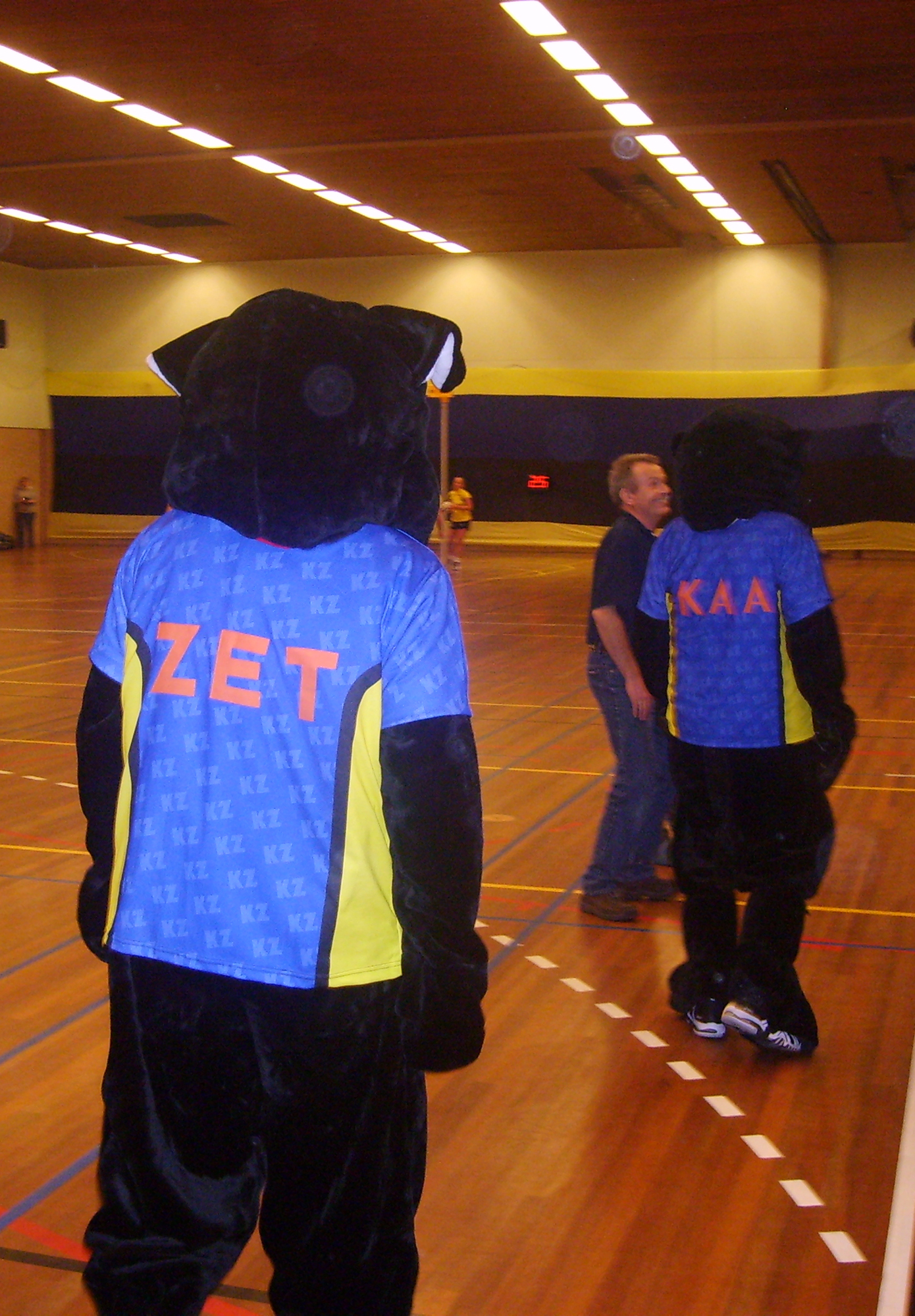 De twee mascottes van korfbalvereniging Koog Zaandijk